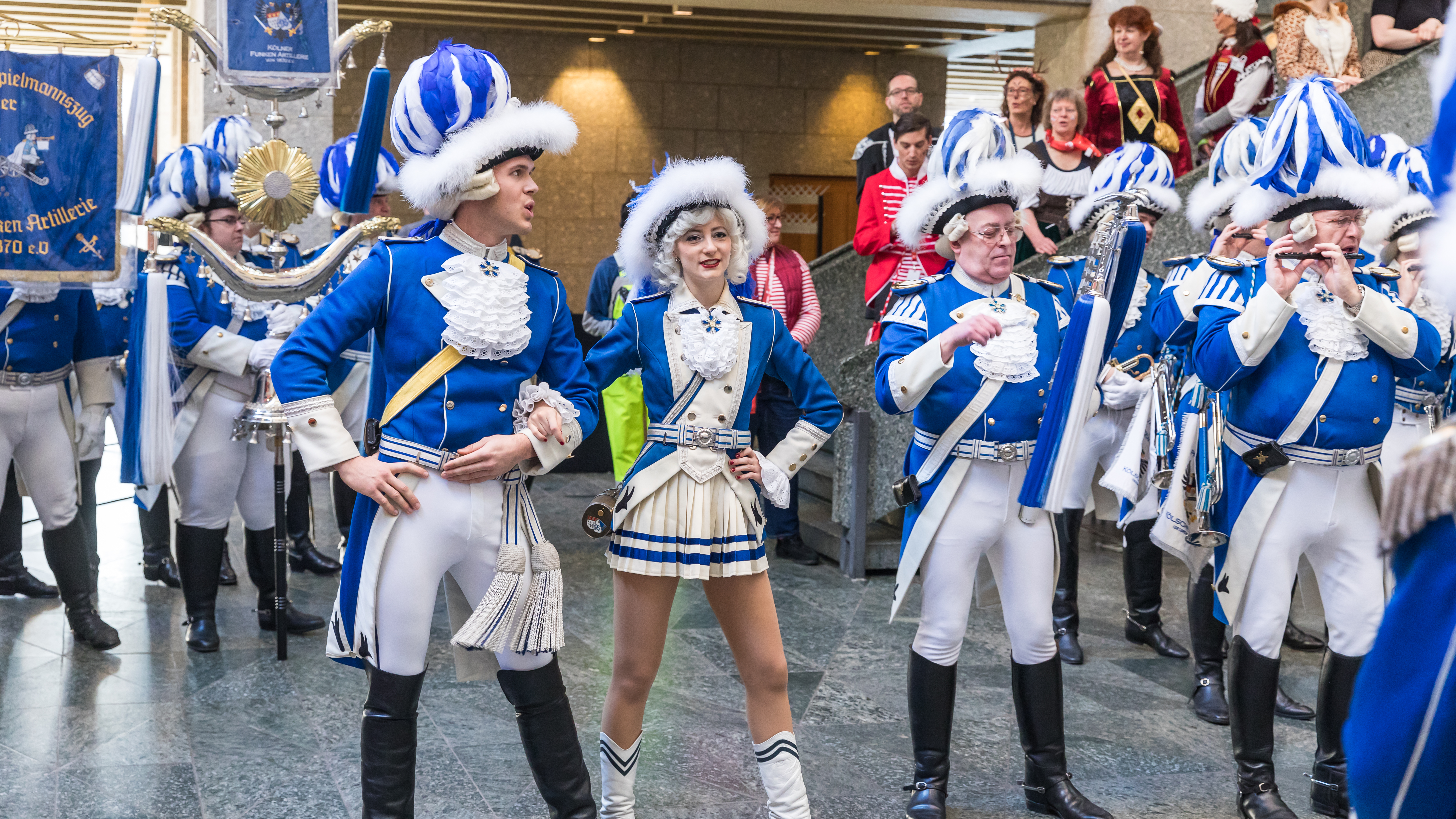 Appell Kölner Funken Artillerie blau weiß von 1870 (Blaue Funken) im Kölner Rathaus - Weiberfastnacht 2019